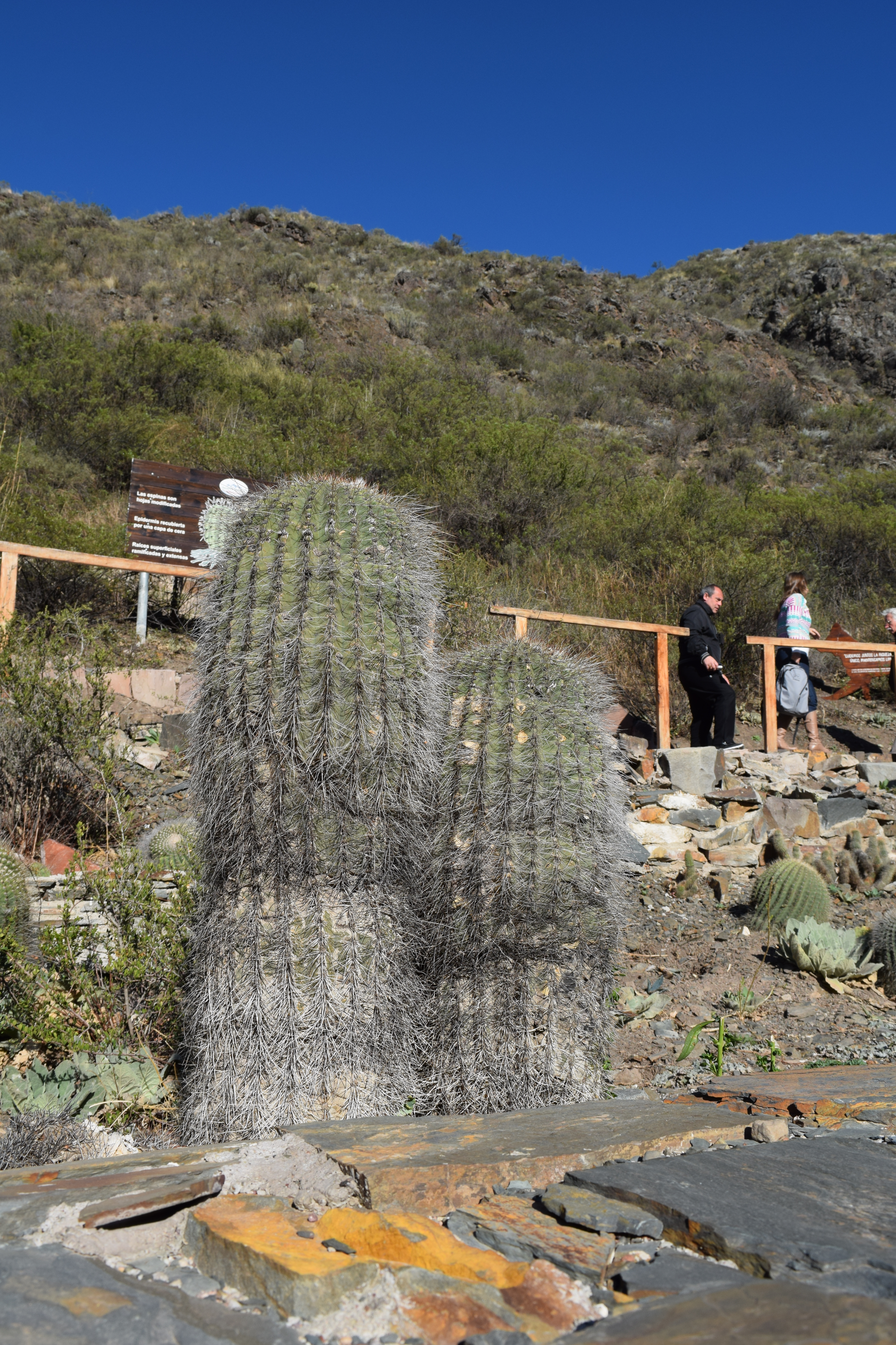 El Jardín de Cactus dentro de la Reserva Natural Villavicencio en Mendoza, Argentina.